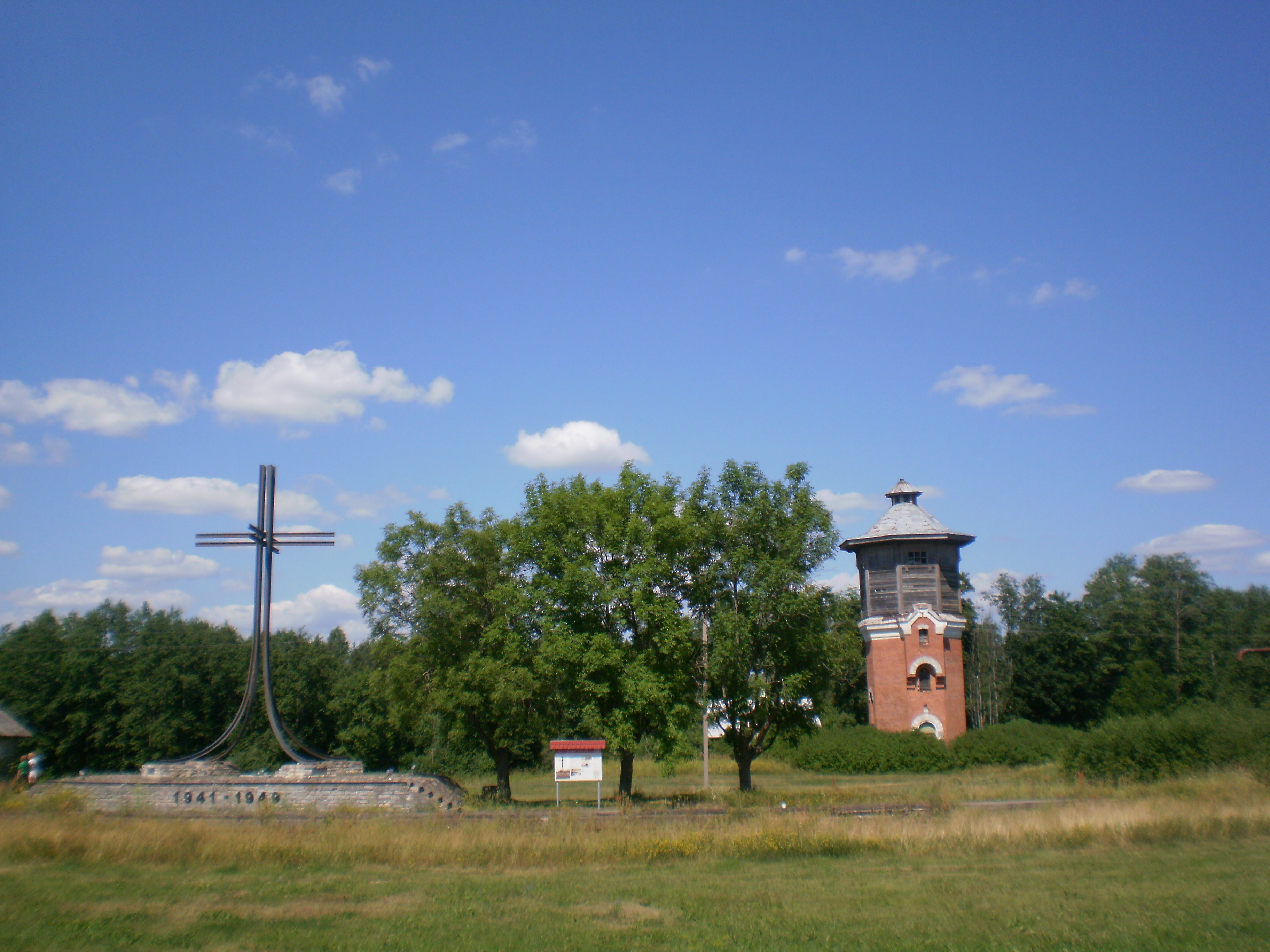 Küüditatute mälestusmärk Ristil Risti raudteejaamas